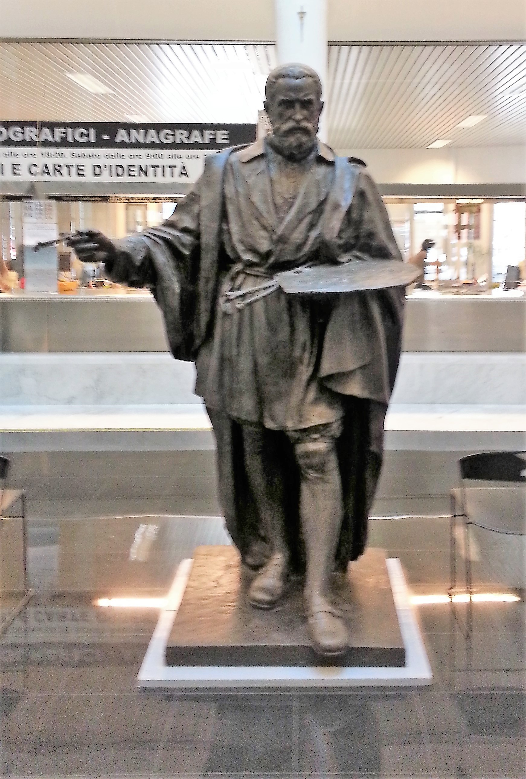 Scultura raffigurante Giovan Battista Moroni